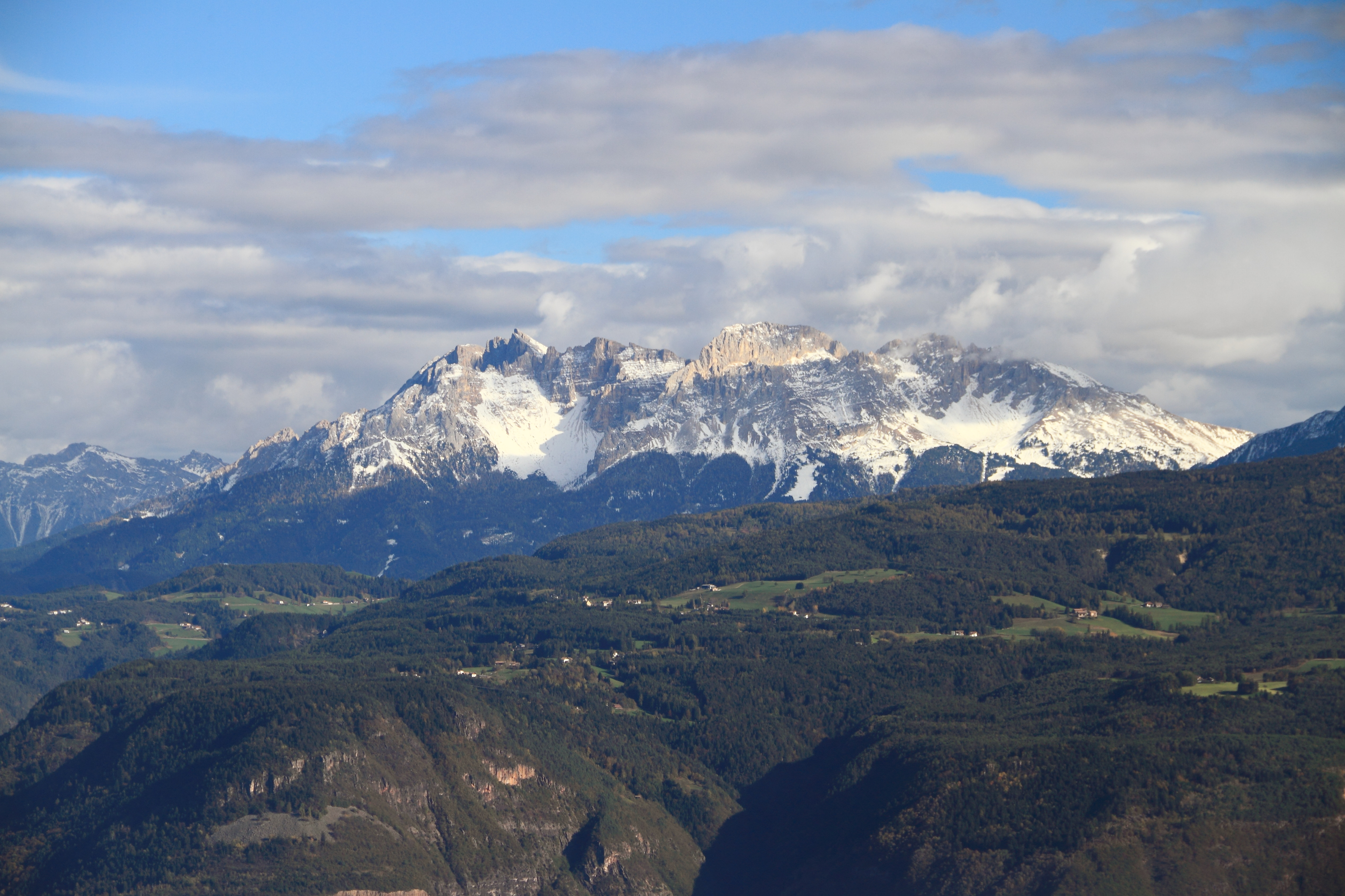 Blick auf den Latemar vom Mendelpass aus gesehen.